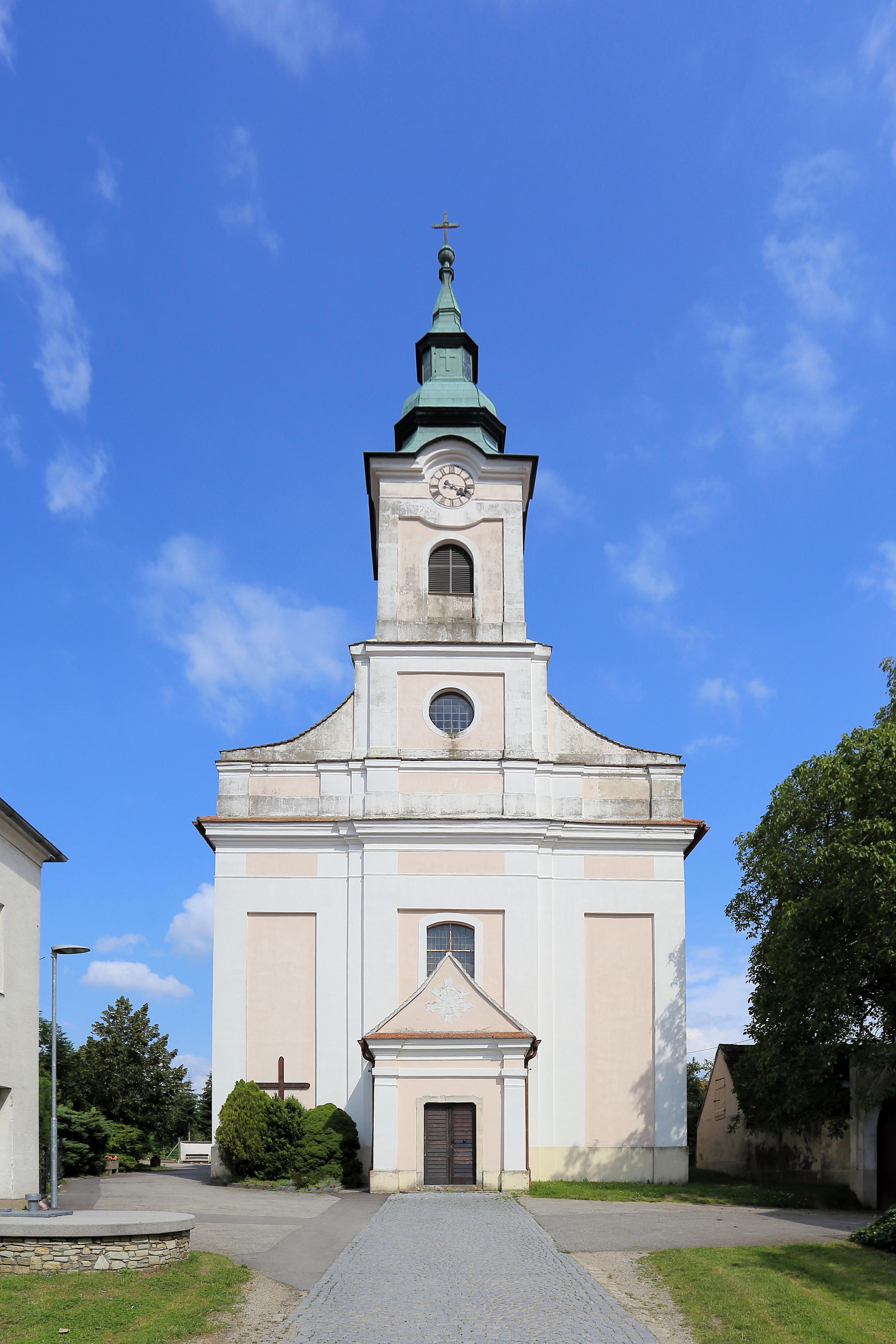 Katholische Pfarrkirche hl. Josef in Tautendorf, ein Ortsteil der niederösterreichischen Marktgemeinde Gars am Kamp.